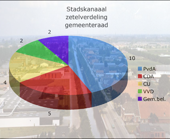 gemeenteraadsverkiezingen 2006 - gemeente Stadskanaal